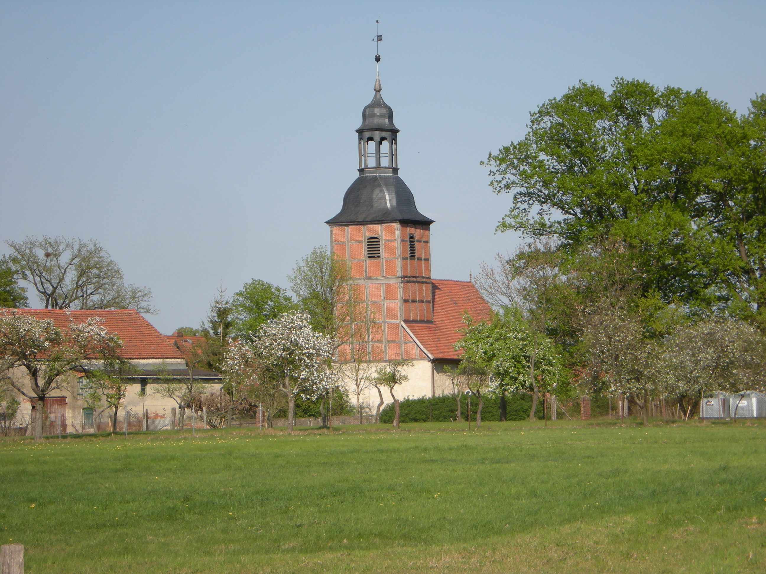 Feldsteinkirch in Laaslich